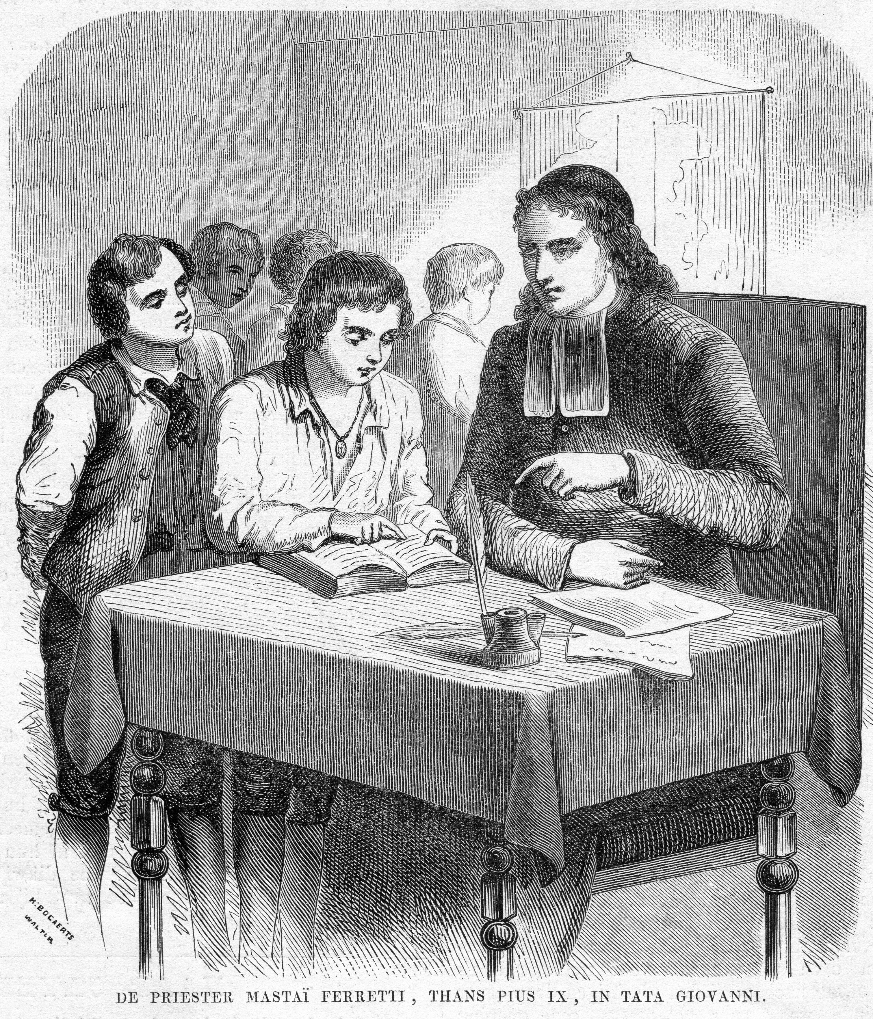 Kath. Illustratie 1869-1870 nr 25 p.126 De priester Masaí Ferretti, thans Pius IX, in Tata Giovanni